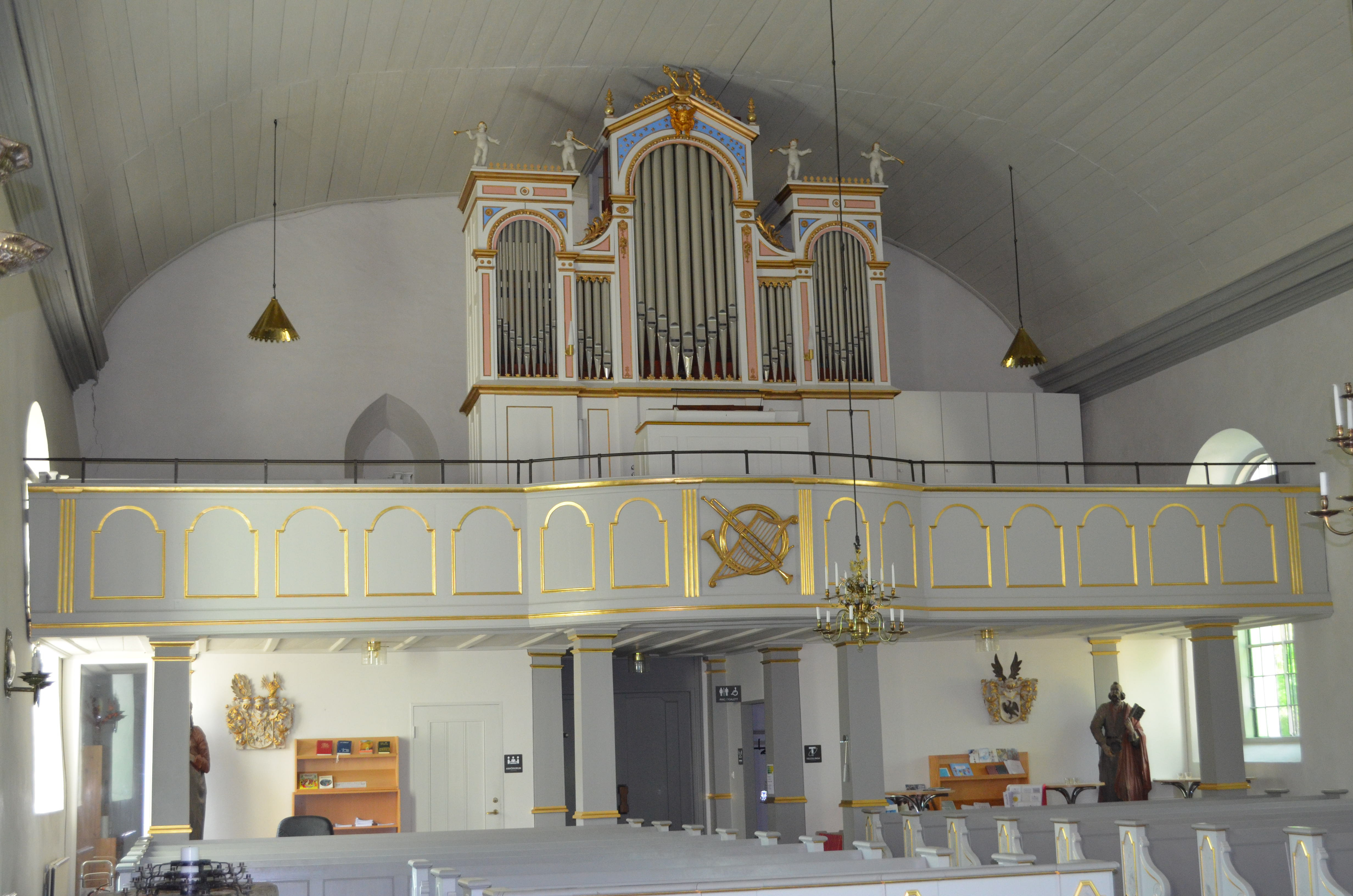 Orgelläktaren.